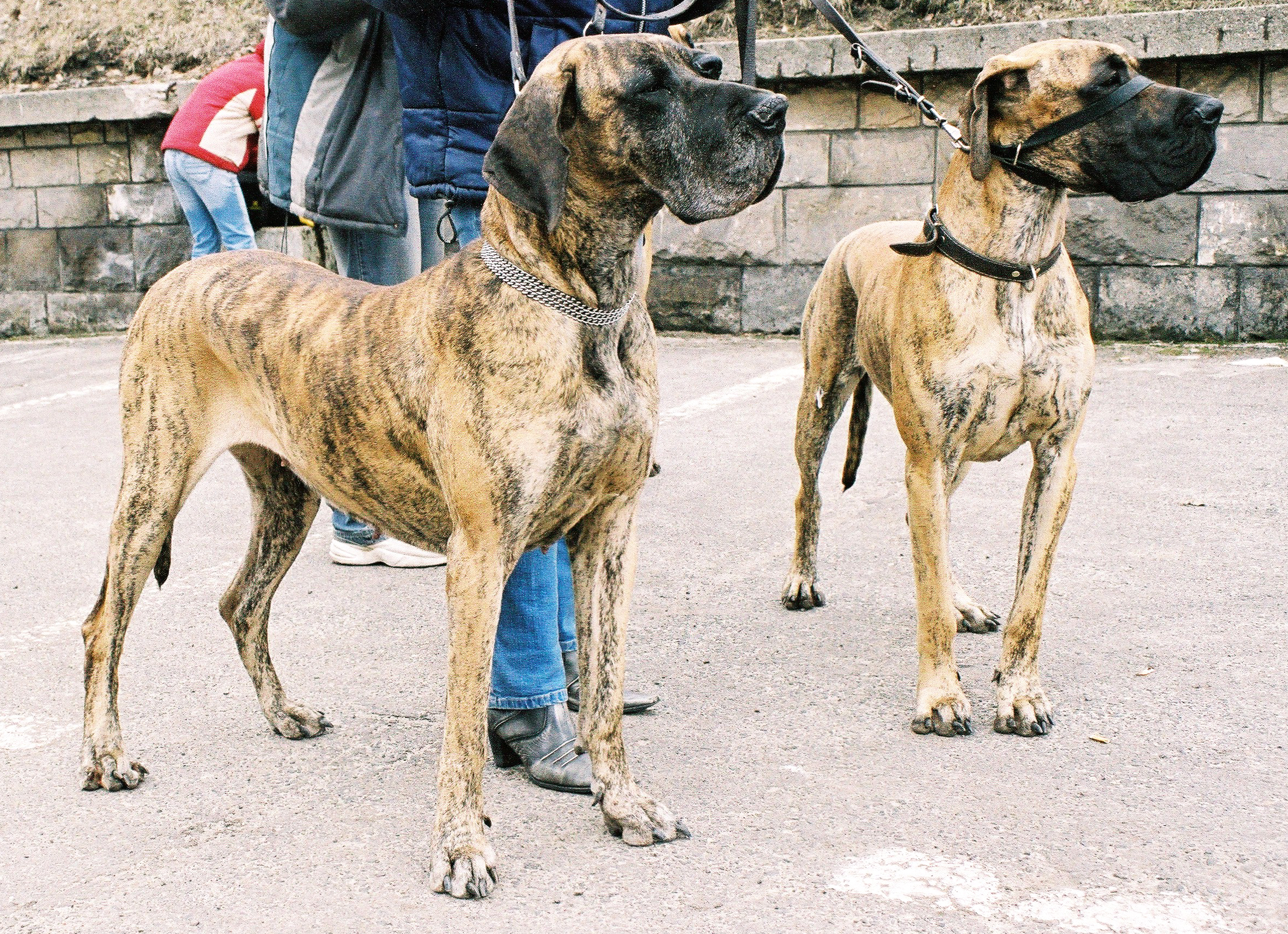 autor: Pleple2000 06:03, 5 April 2006 (UTC)